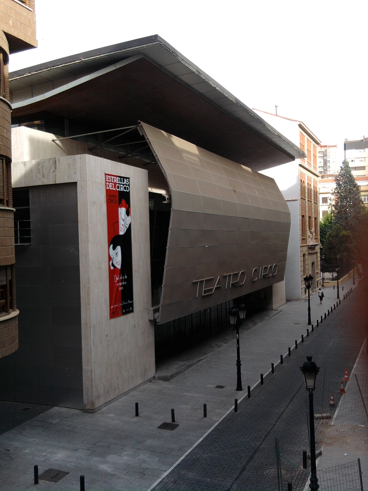 Teatro Circo de Albacete